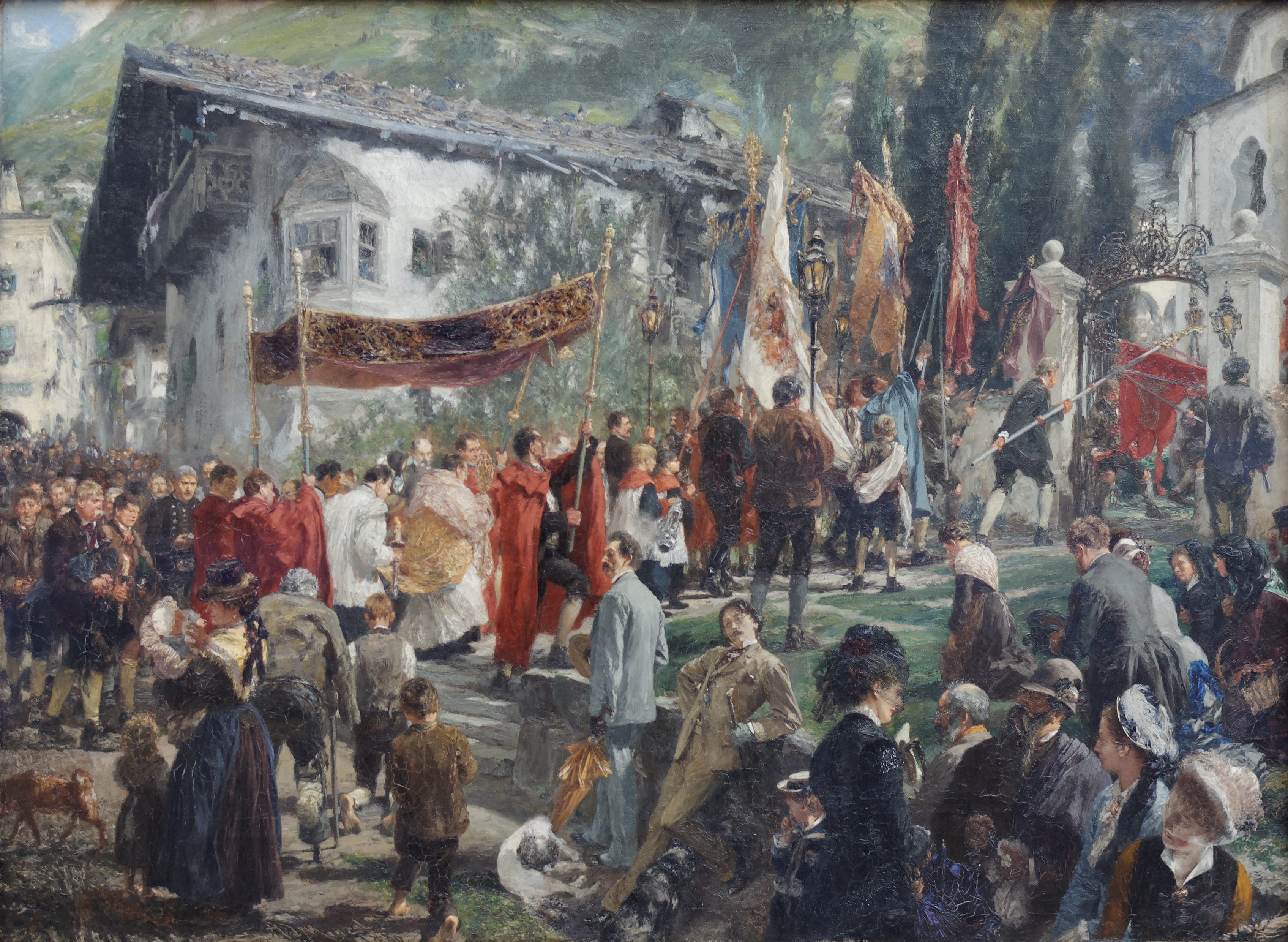 Procession à Hofgastein. Adolph von Menzel 1880. Exposé à la Neue Pinakothek de Munich. Inv Nr. L 817